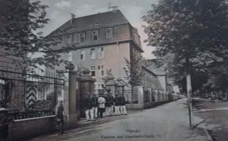 Eisenbahn Kaserne in Hanau